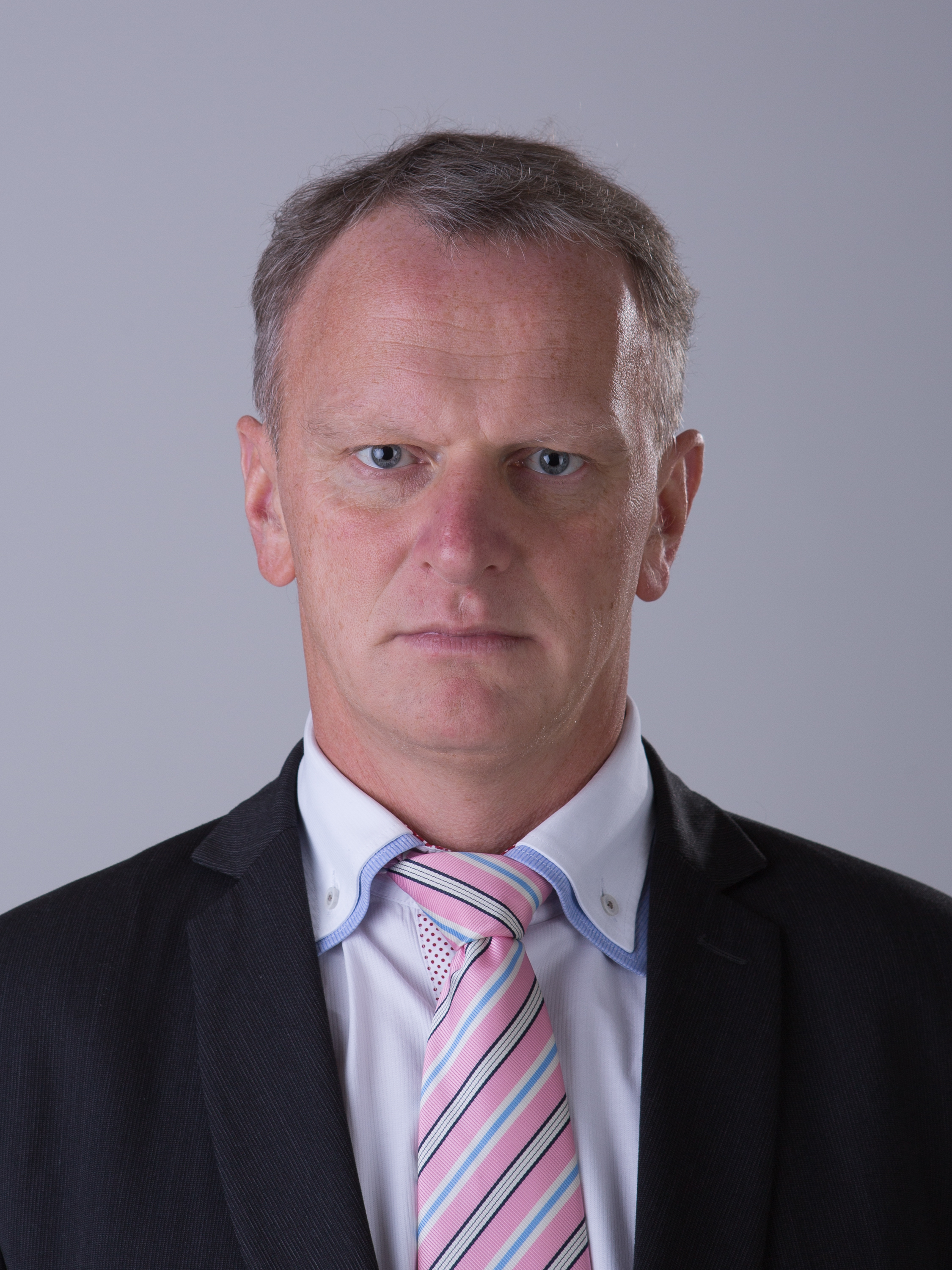 2014.gada 9.decembris. 12.Saeimas deputāts Gaidis Bērziņš. Foto: Ernests Dinka, Saeimas Kanceleja Izmantošanas noteikumi: saeima.lv/lv/autortiesibas